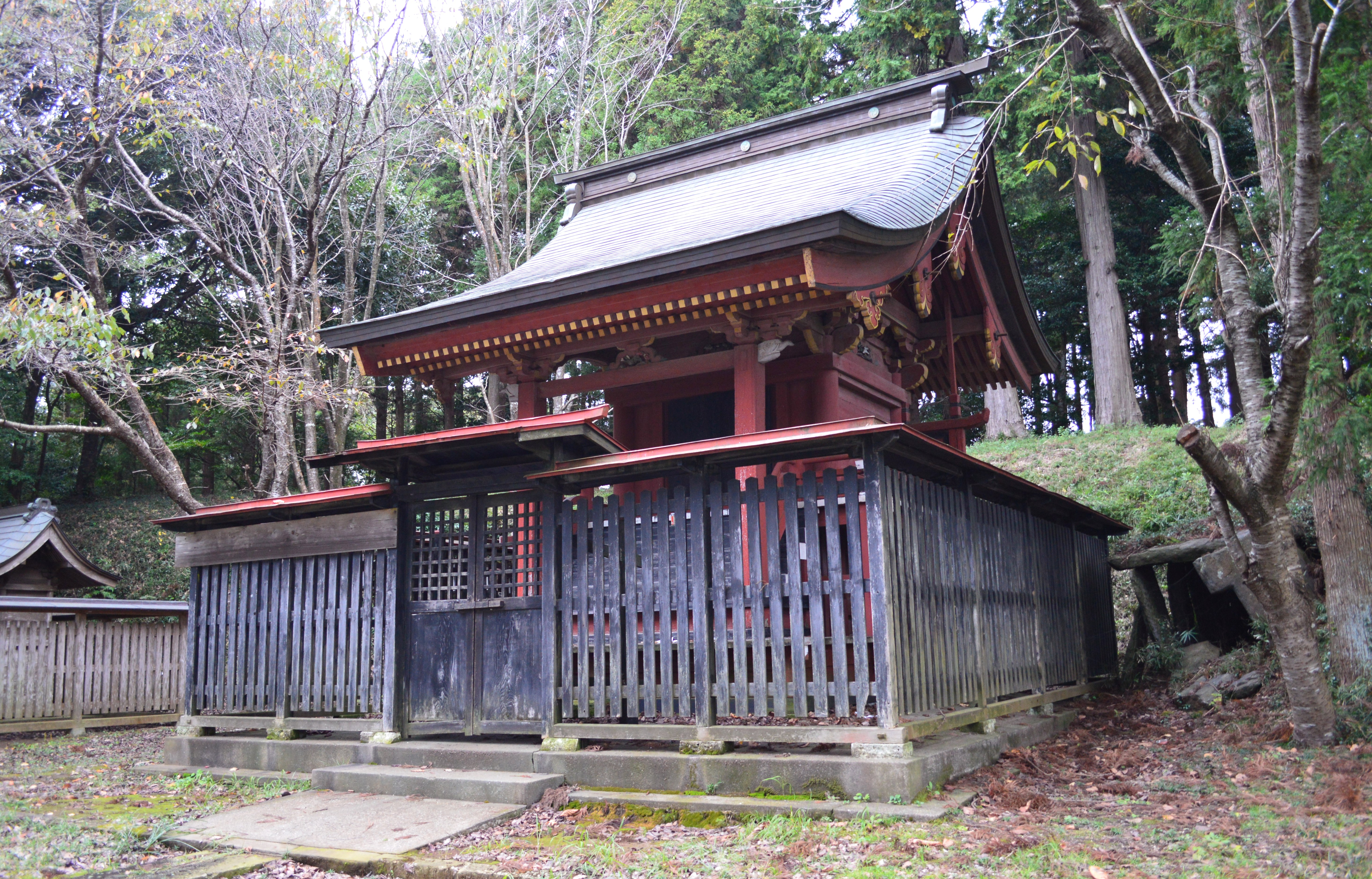 又見神社 (香取神宮境外摂社)